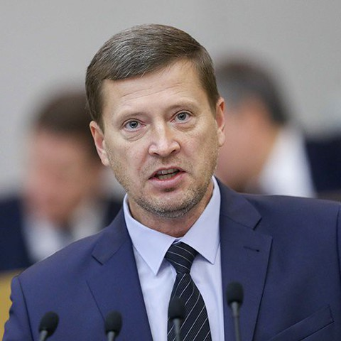 С.В. Иванов депутат Государственной Думы